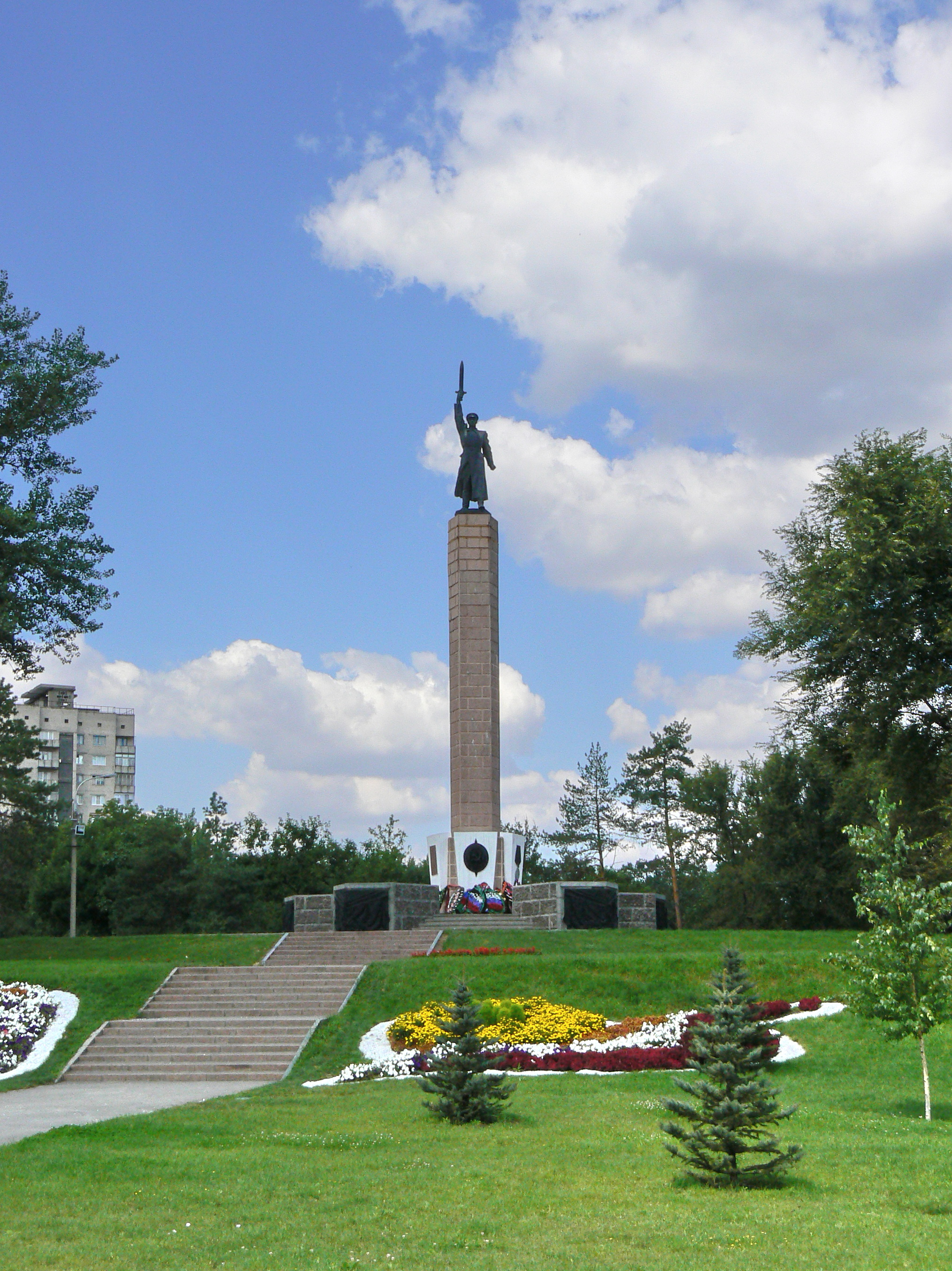 Площадь чекистов в Ворошиловском районе Волгограда